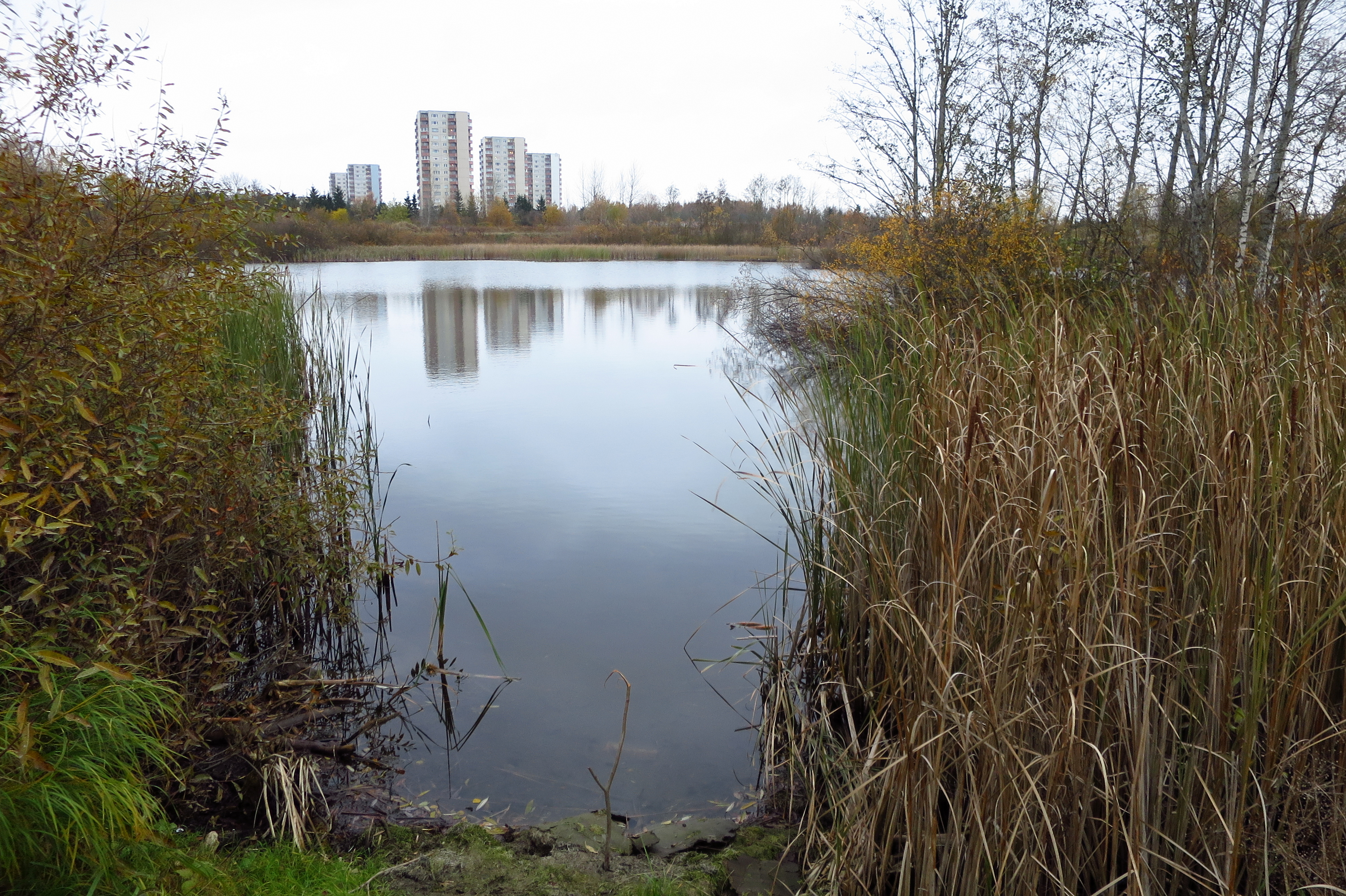 Tooma järv Tallinnas